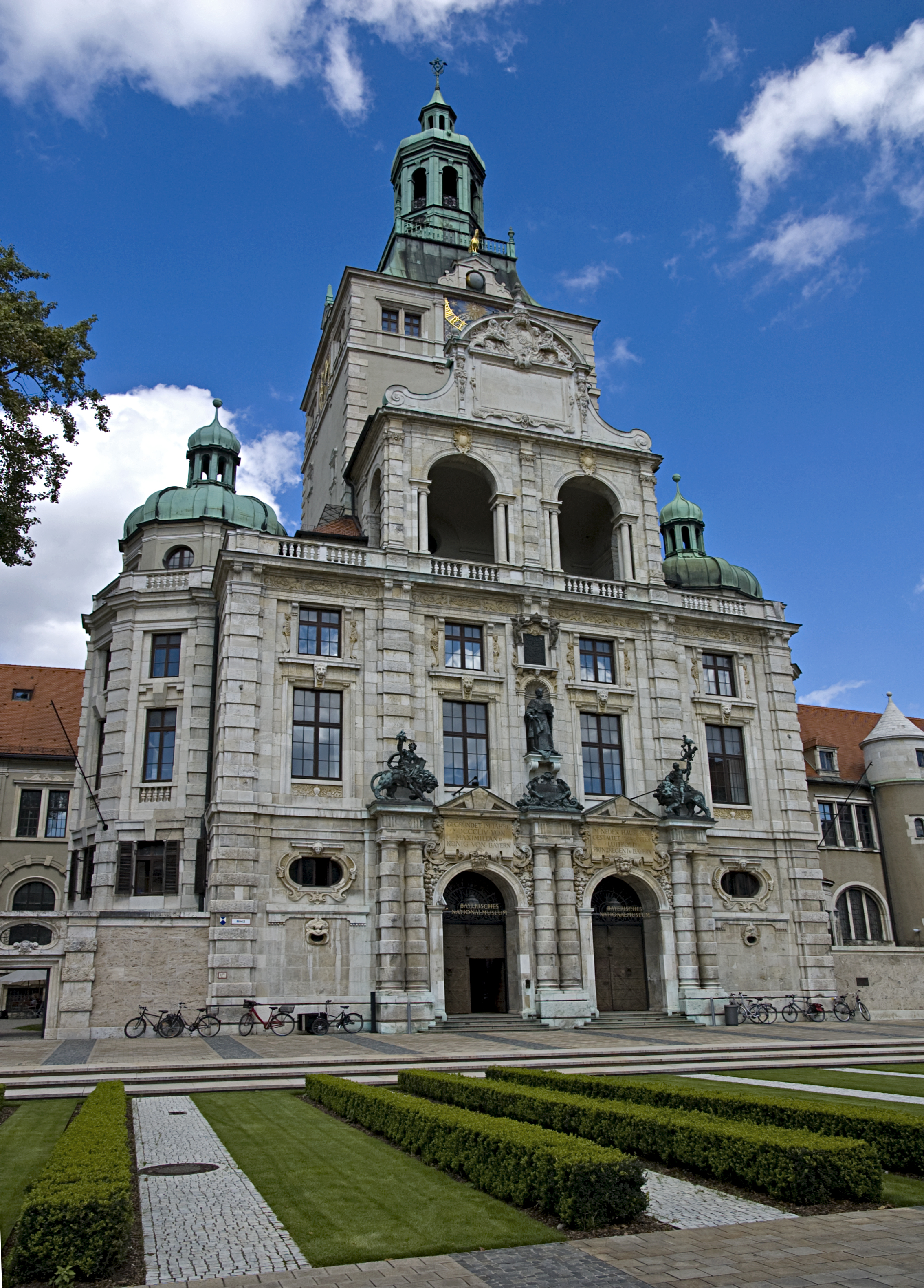 Bayerisches Nationalmuseum, München